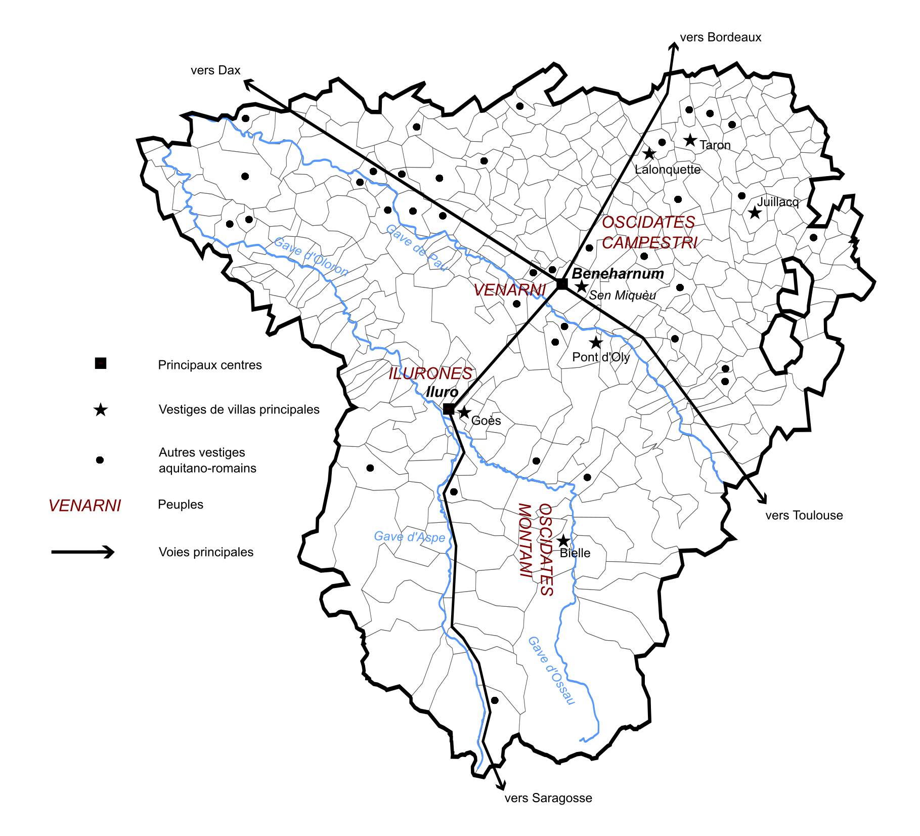 Carte du Béarn durant l'Antiquité